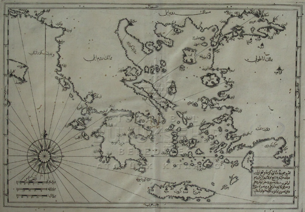 Piri Reis'in Kitab-ı Bahriyye isimli eserinde Mora Yarımadası